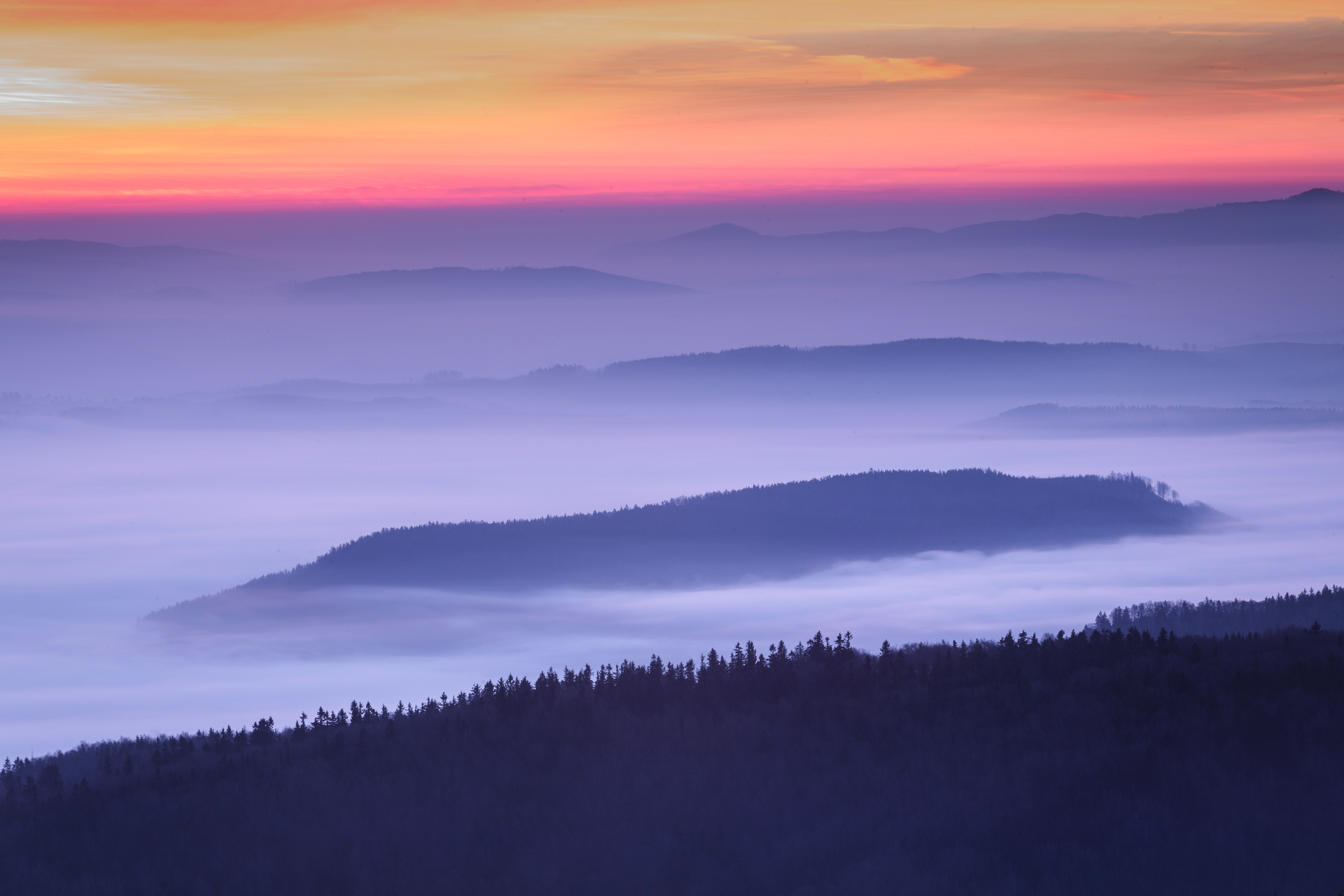 Park narodowy: Park Narodowy Gór Stołowych widok ze Szczelińca Wielkiego na Góry Stołowe i ich otulinę This is a photography of protected area with CRFOP ID PL.ZIPOP.1393.PN.15